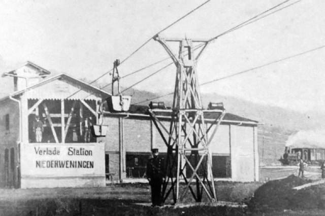 Verladestation in Niederweningen der Lorenseilbahn der Zementfabrik Lägern. Nach der Foto zu schließen handelt es sich um eine von Julius Pohlig hergestellte Otto'sche Seilbahn. Die Wagen sind mit Gewichthebelkupplungen ausgerüstet. Die Vertretung für die Schweiz und Italien hatte Fritz Marti in Winterthur inne.